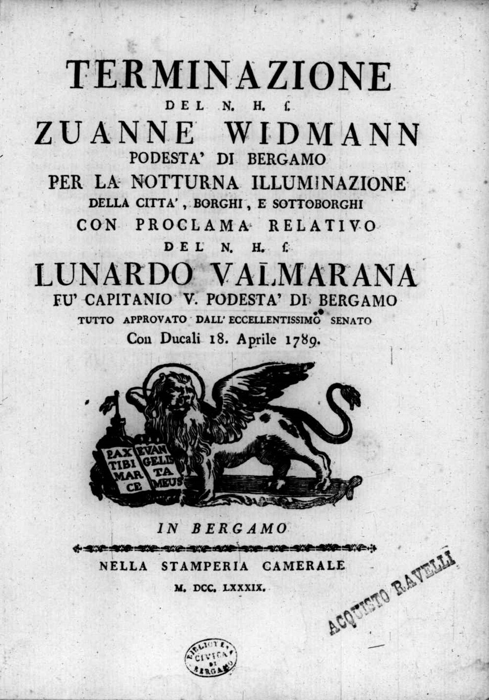 Frontespizio